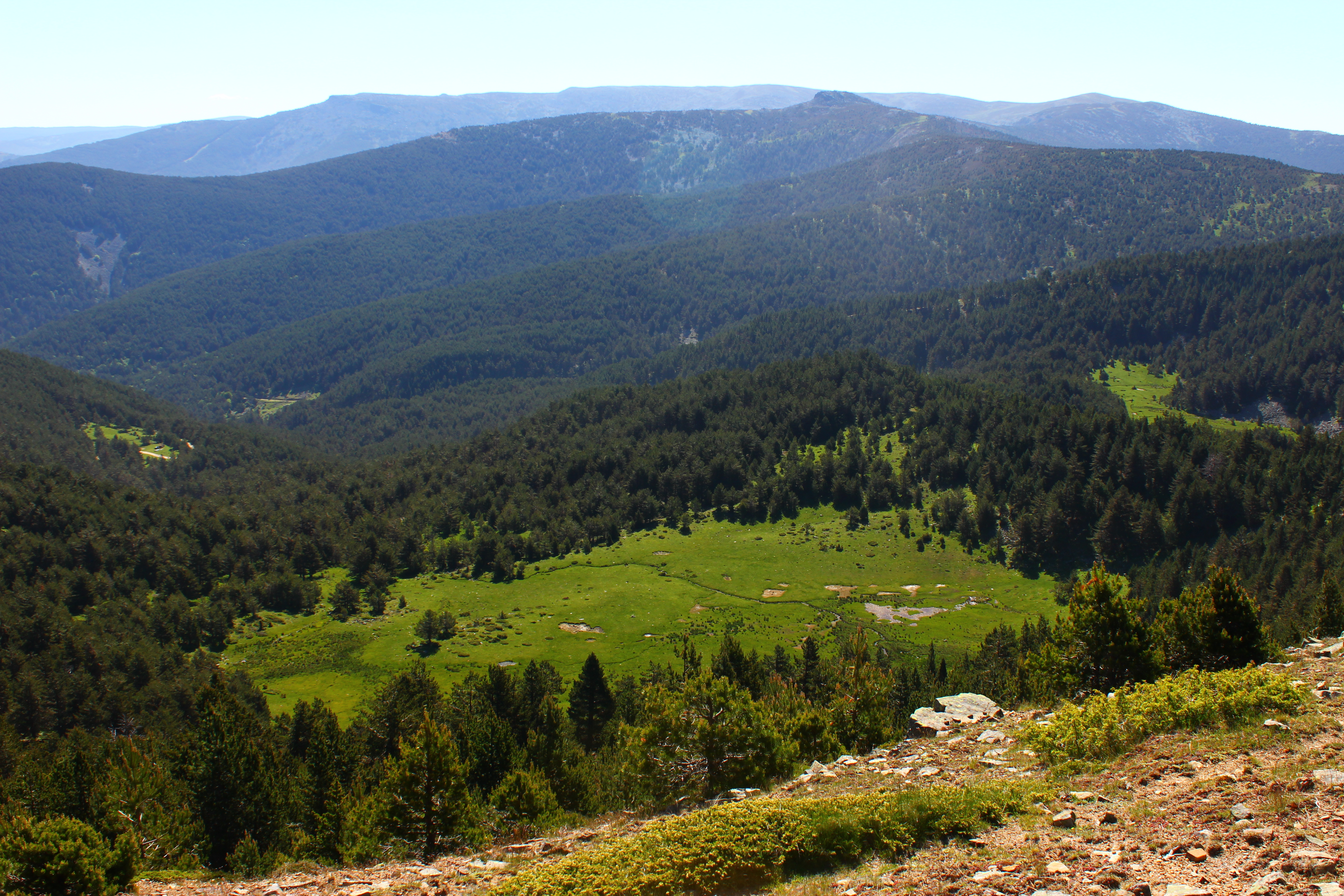 Sierras de Demanda, Urbión, Cebollera y Cameros This is a photography of a Special Area of Conservation in Spain with the ID: ES0000067. Natura2000 entry, EEA entry